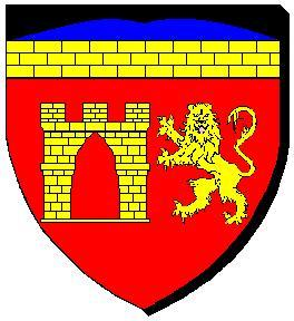 Blason de la commune de Montézic, Aveyron, France ; De gueules à la porte d'or maçonnée d'or placée à dextre et au léopard lionné d'or placé à senestre ; au chef de sinople à la montagne d'azur, soutenue d'une fasce d'or maçonnée de sable.Dessiné par klari.333 Licensing Catégorie:Blason à unifier